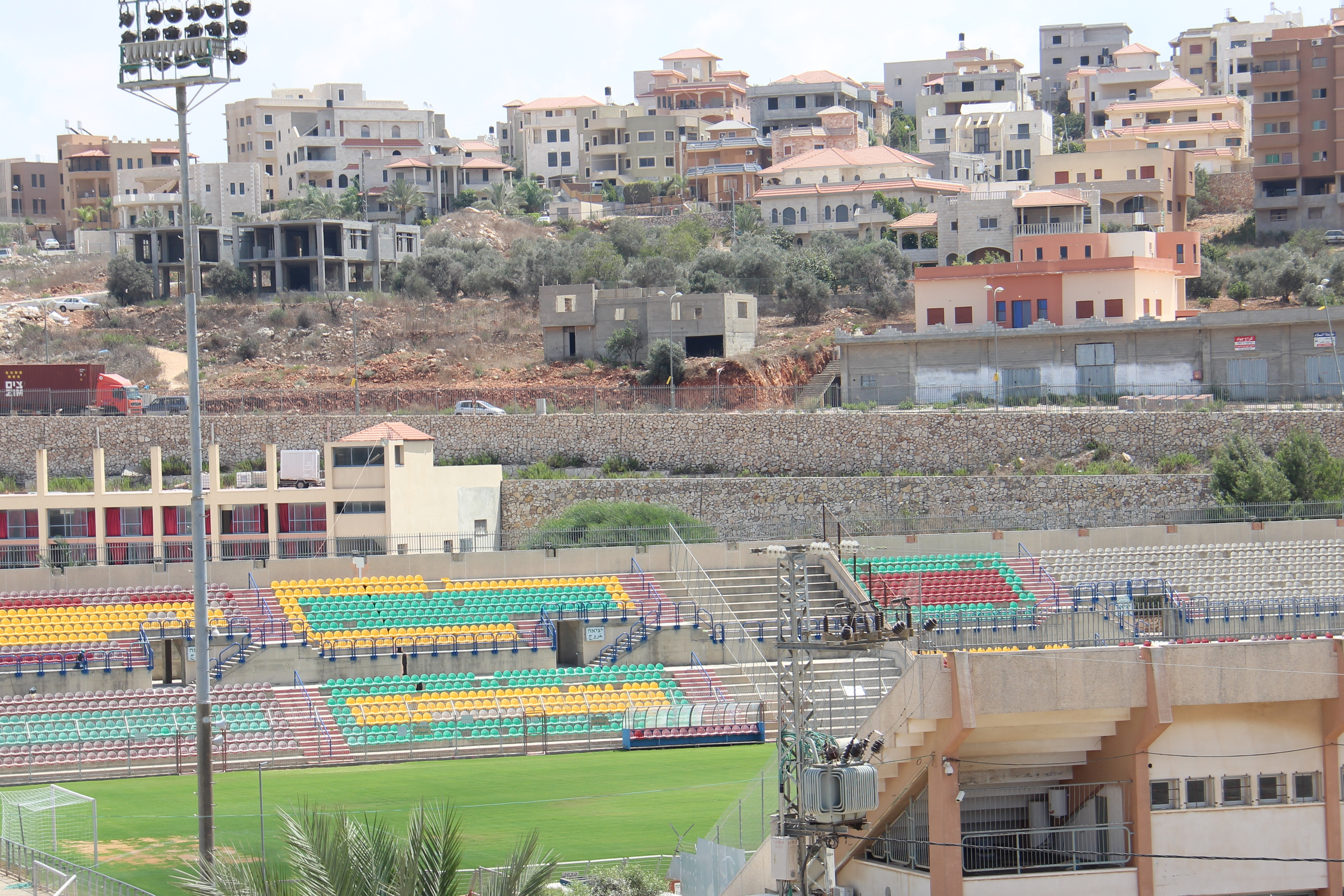 ملعب السلام